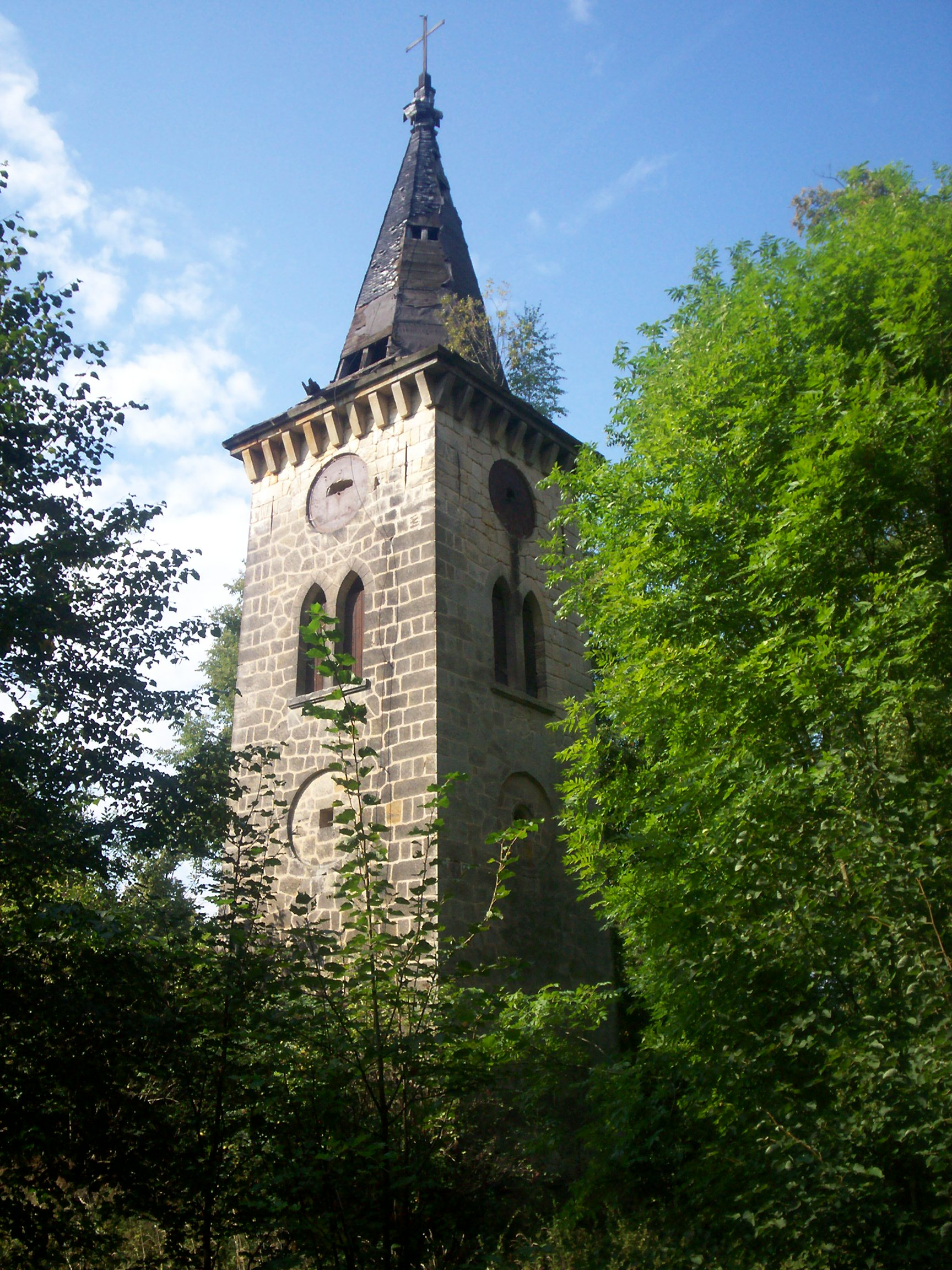 Płóczki Górne, ruiny kościoła ewangelickiego.